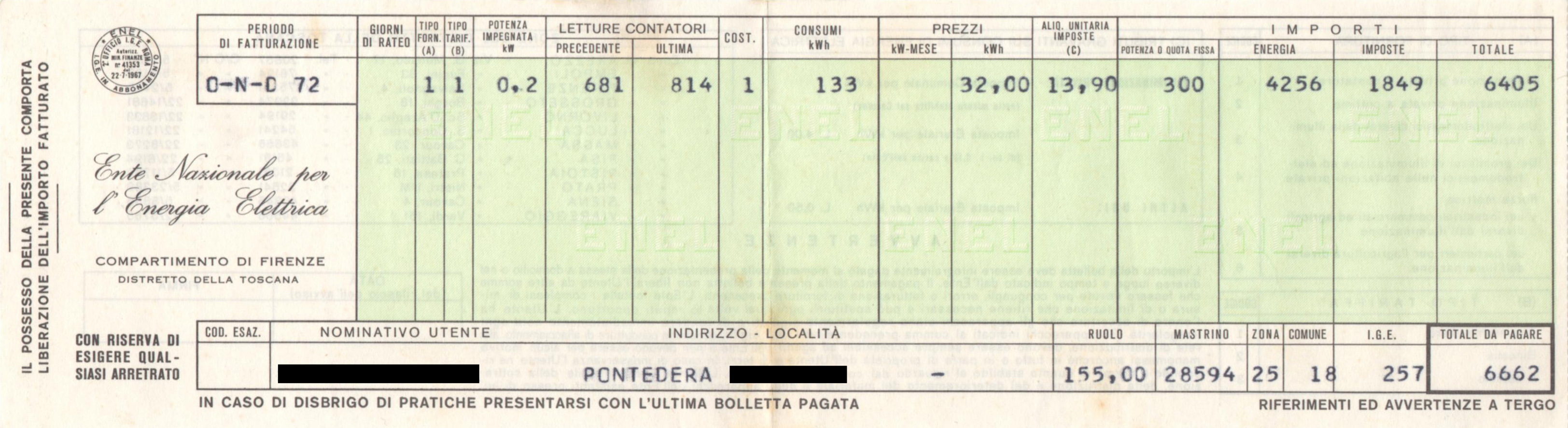 Bolletta dell'ENEL relativa all'ultimo trimestre (O-N-D) del 1972